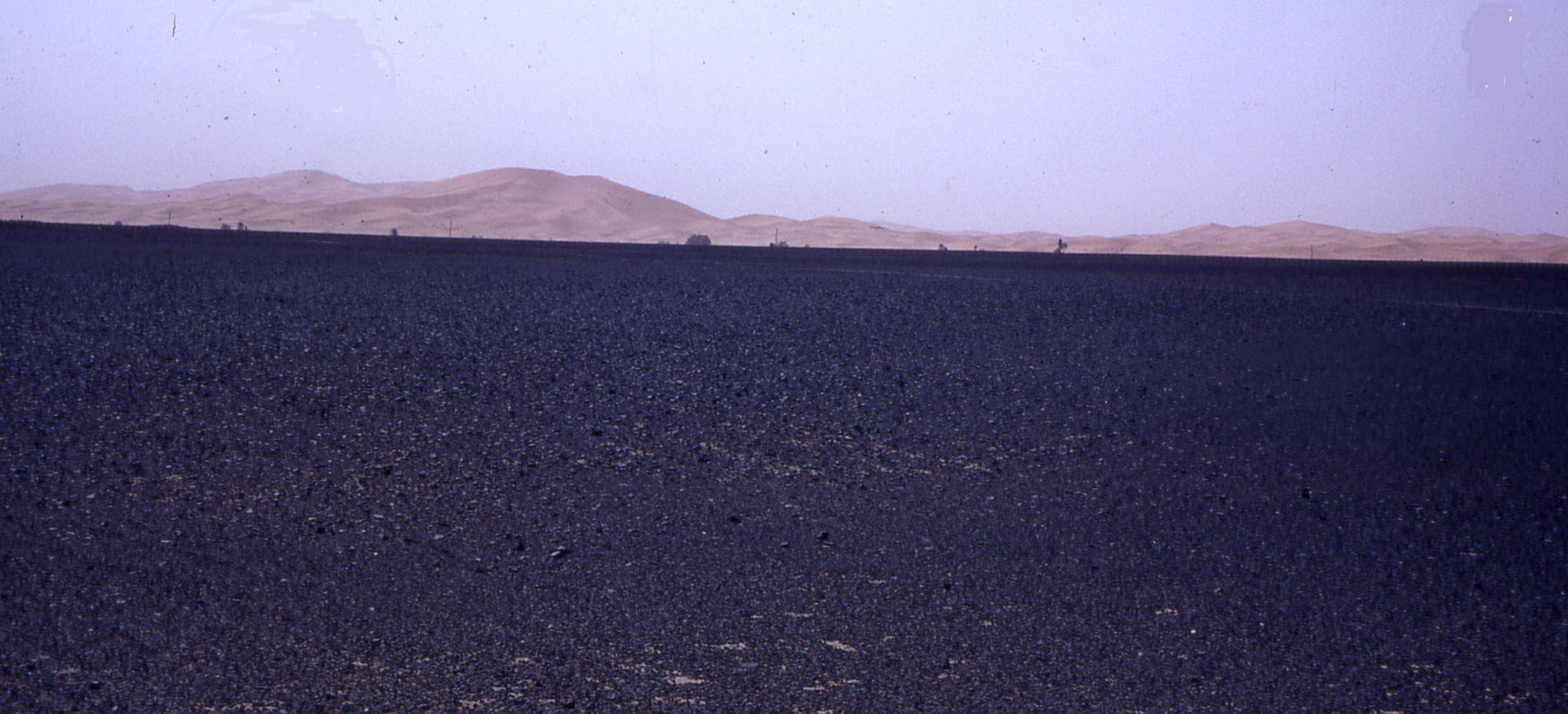 au premier plan le reg (cailloux de couleur noire, dans le fond massif dunaire